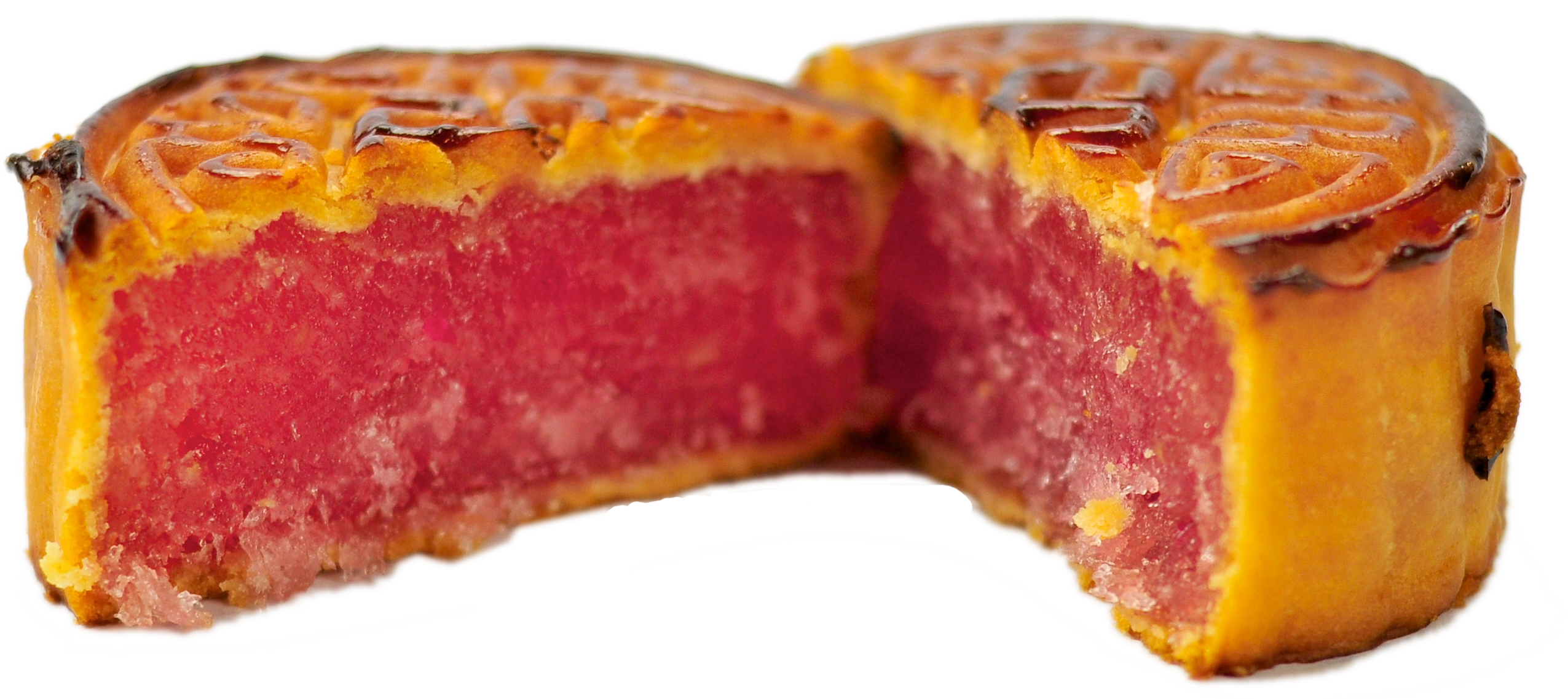 月饼。 This file has been extracted from another file: Moon Cake Filling.jpg